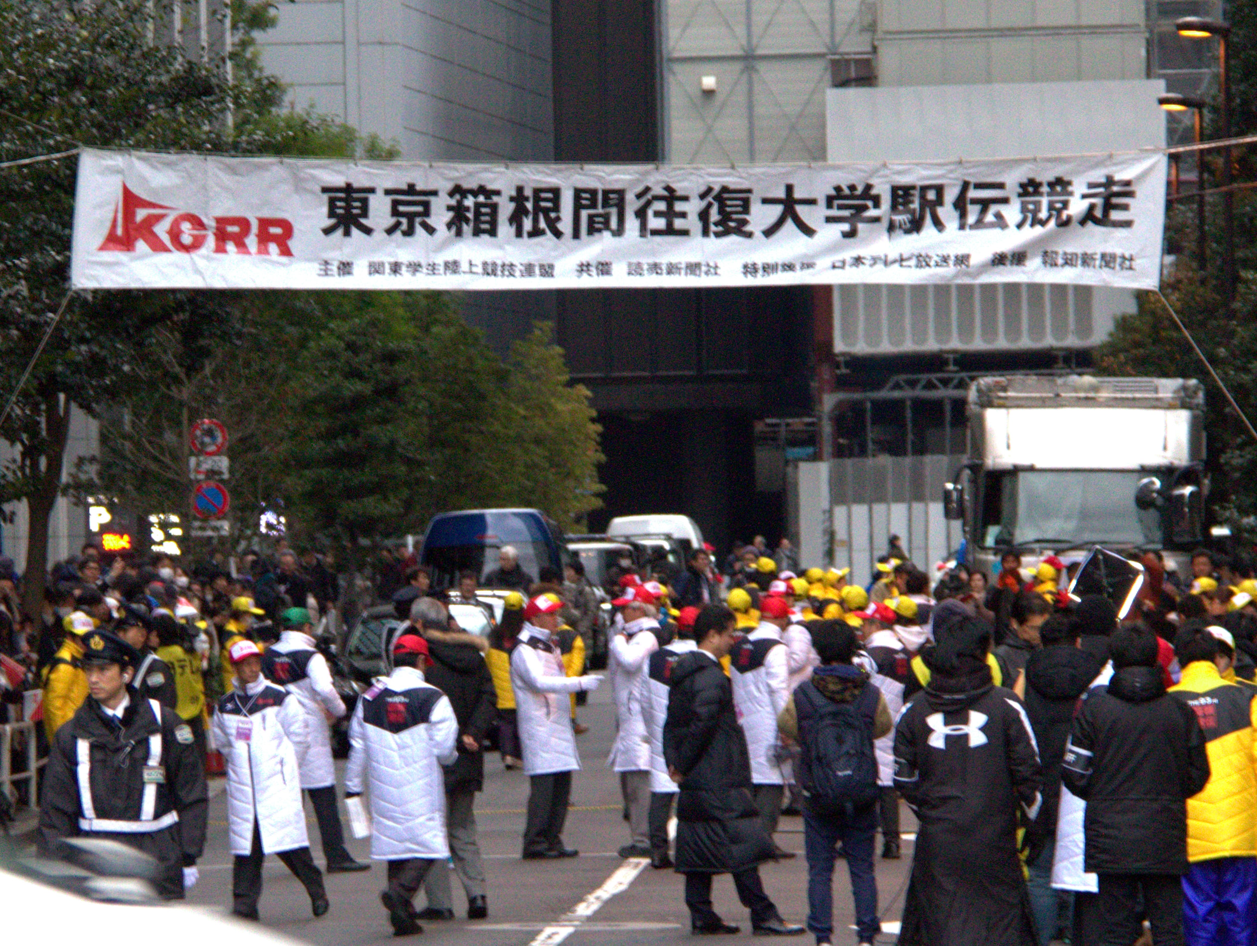 第93回東京箱根間往復大学駅伝競走(2017年箱根駅伝)スタート地点